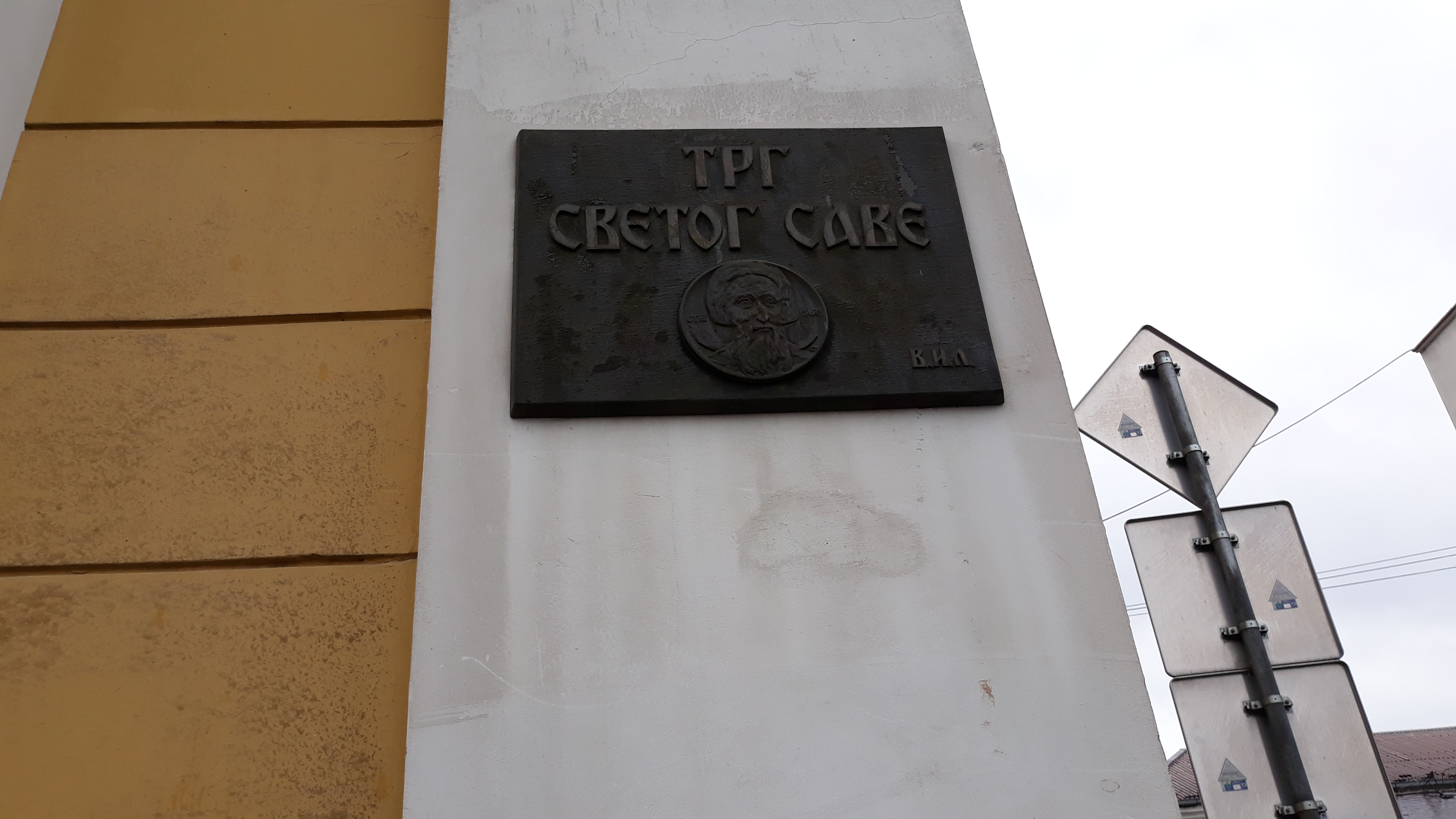 Трг Светог Саве у Краљеву